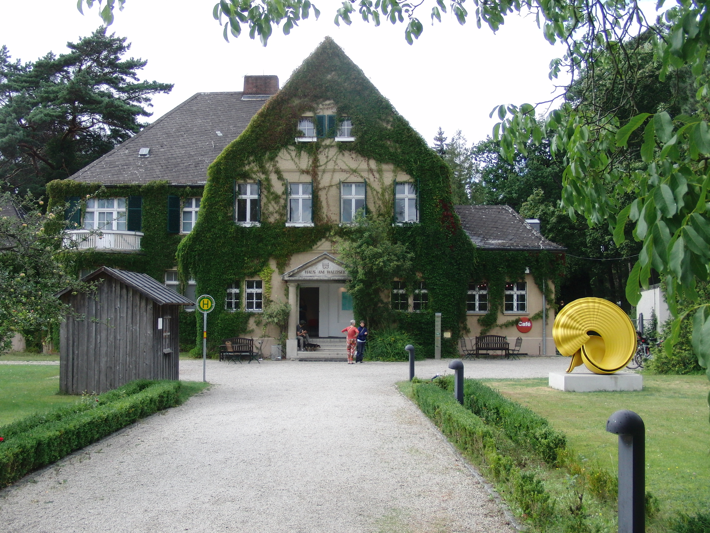 Eingang zum Haus am Waldsee, Berlin-Zehlendorf mit Skulpturen von T. Cragg, rechts und M. Sailstorfer (Wartehäuschen)